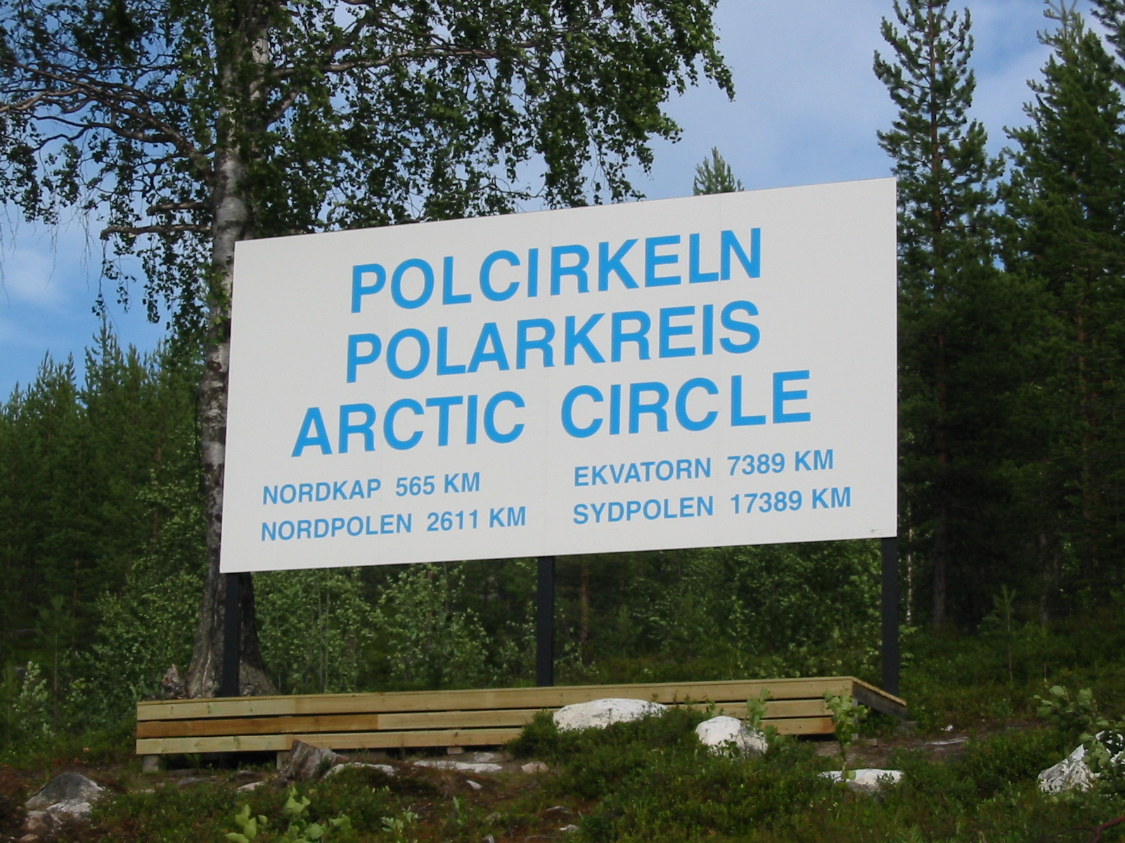 Polarkreis in Schweden an der Inlandsbahn.